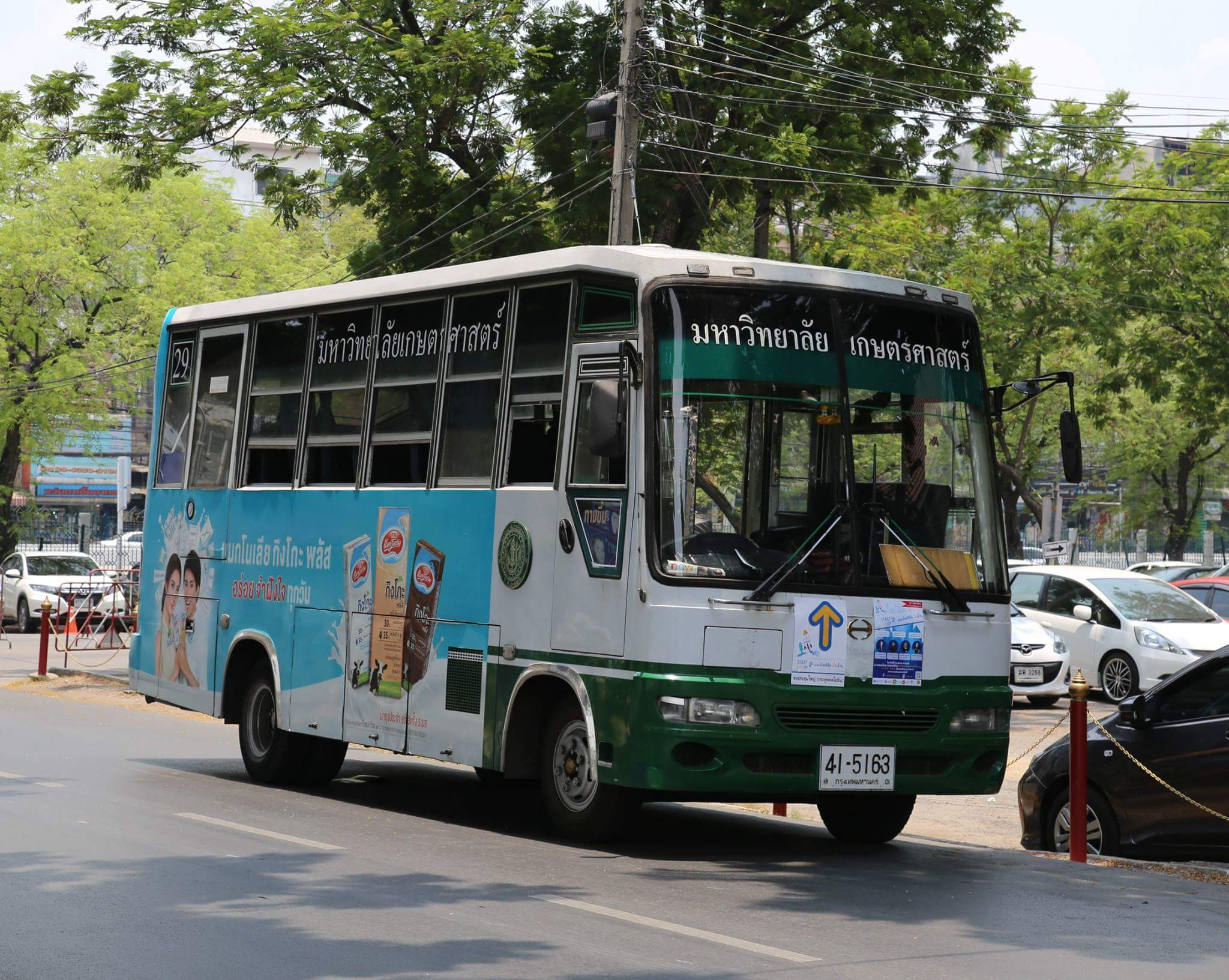 รถตะลัย มหาวิทยาลัยเกษตรศาสตร์